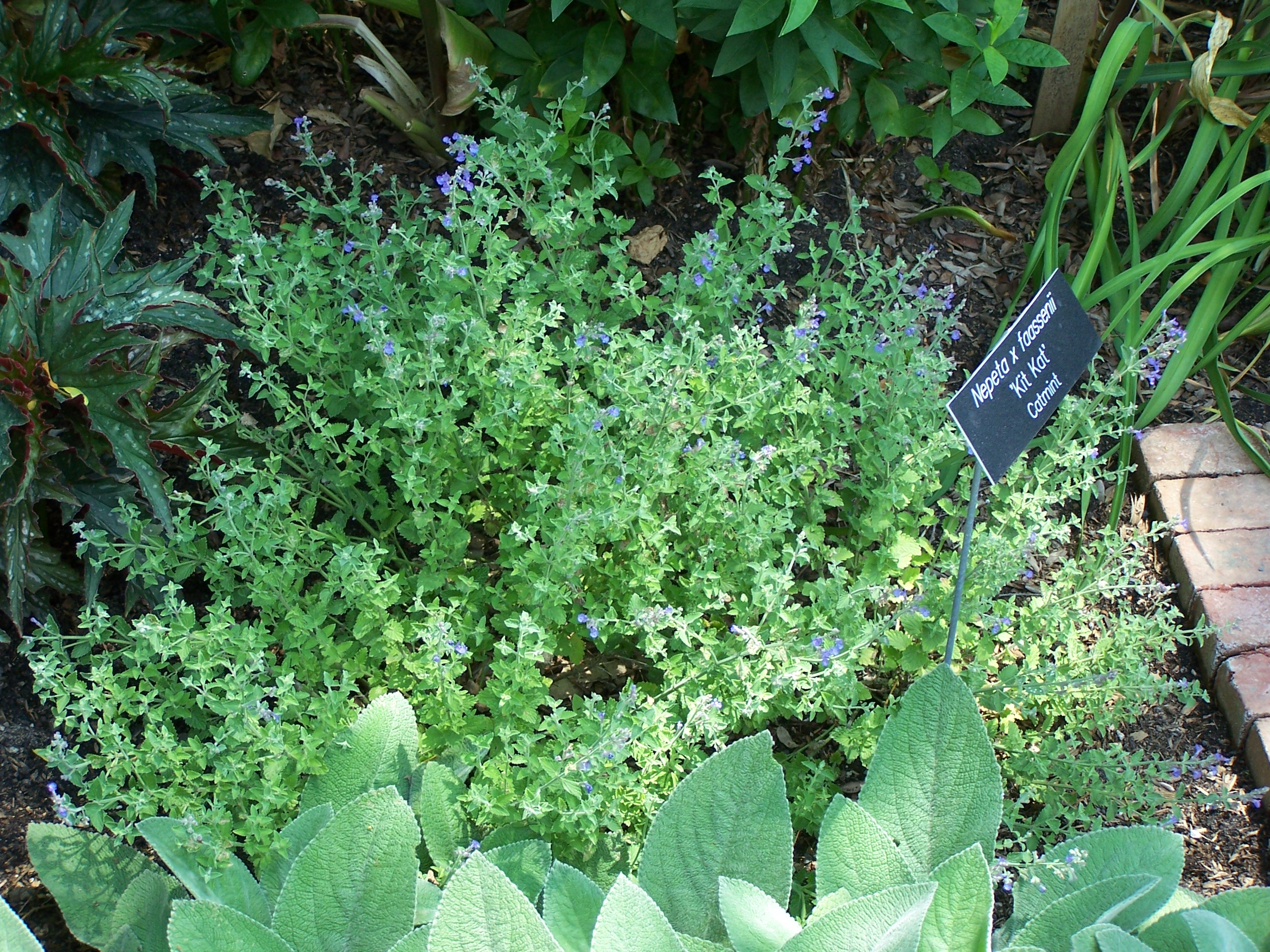 nepeta x faassenii 'Kit Kat' catmint at Minnesota Landscape Arboretum